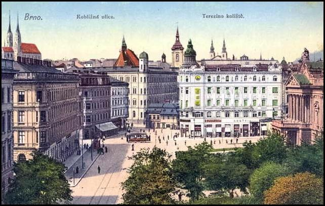 Terezino koliště s ústím Kobližné ulice a divadlem